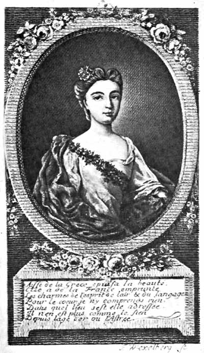 Portrait of Mademoiselle Aïssé (c. 1694-1733)